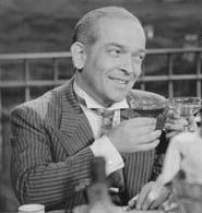 José Ramírez- actor